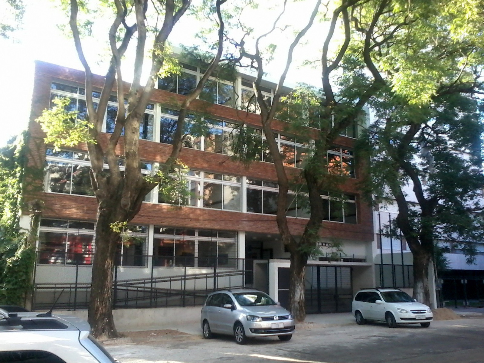 Liceo Joaquin Suarez. Nuevo edificio educativo. Ubicación Pedro Berro 773. Pocitos. Montevideo. Uruguay. Proyecto arquitectas Alicia Dauria, Andrea Gnesetti.